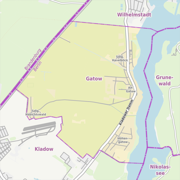 Übersichtskarte der Straßen und Ortslagen in Berlin-Gatow